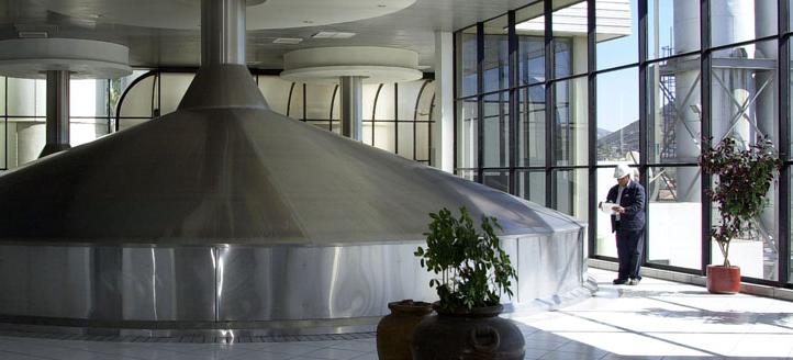 Cervecería Cuauhtémoc Moctezuma i Tecate.